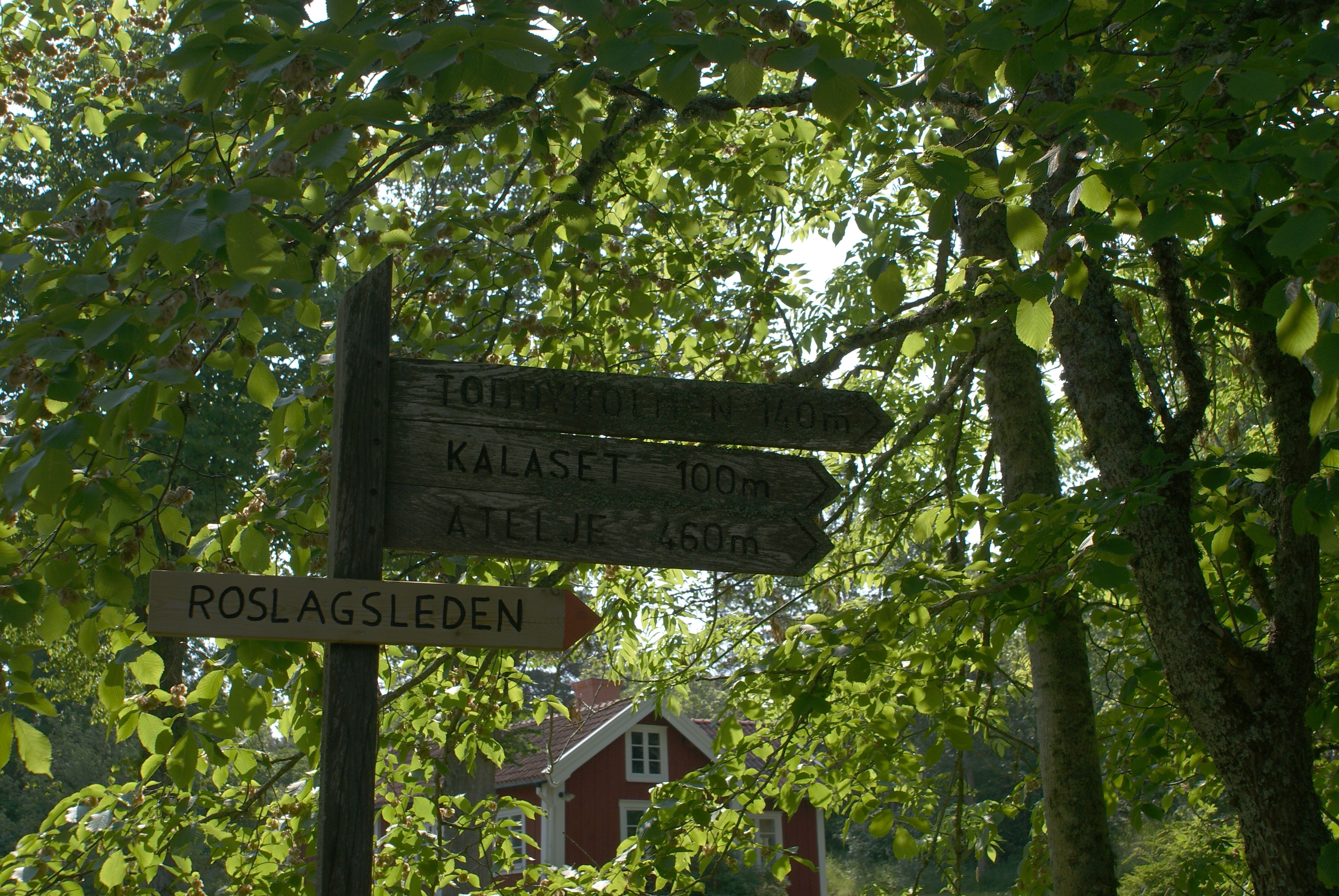 Roslagsleden där den går förbi Albert Engströms museum som skymtar i bakgrunden. This file was made possible through a cooperation with the Cloudberry project.